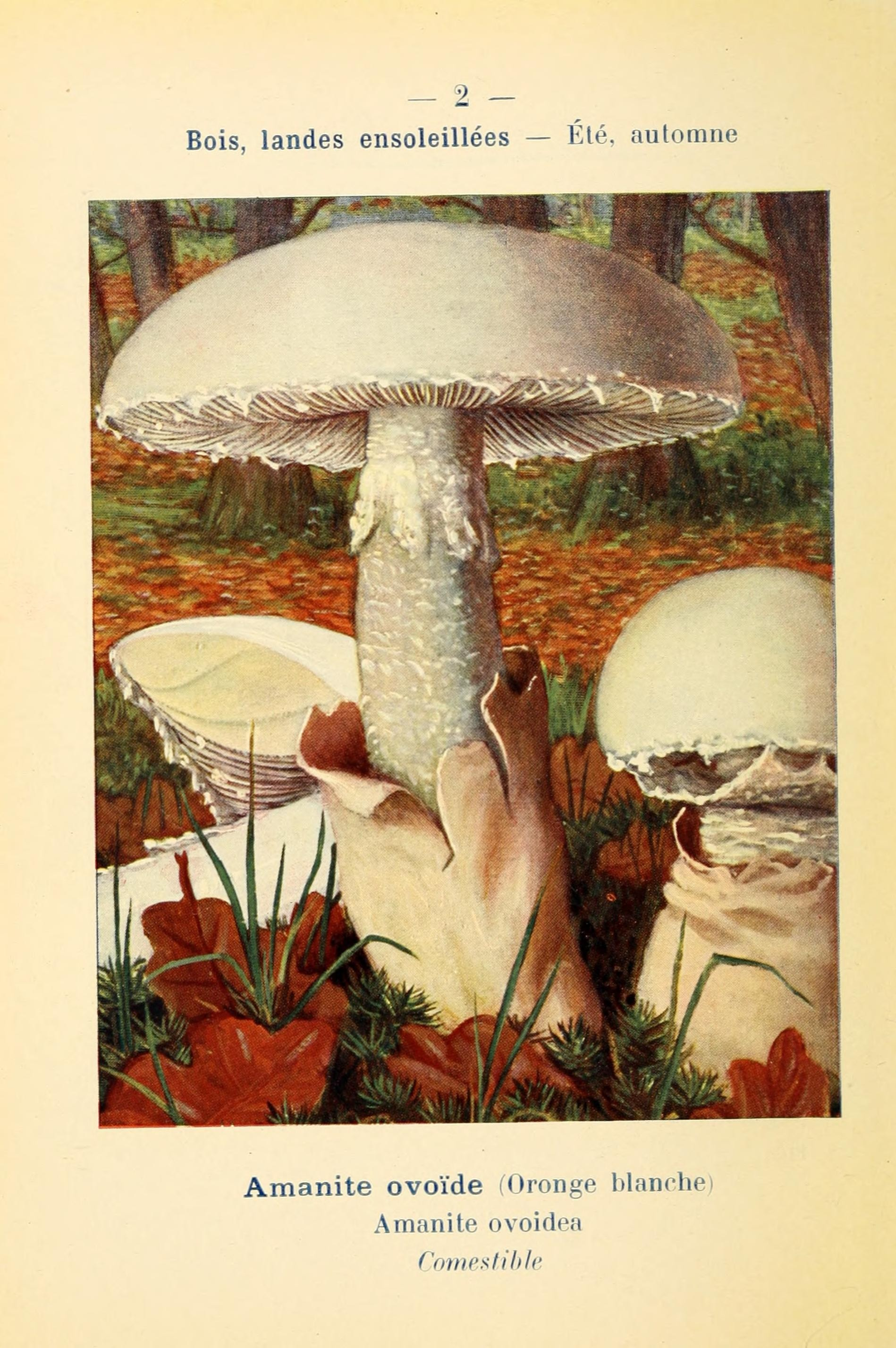 — 2 - Bois, landes ensoleillées — Été, automne Amanite ovoïde (Oronge blanche) Amanite ovoidea Comestible